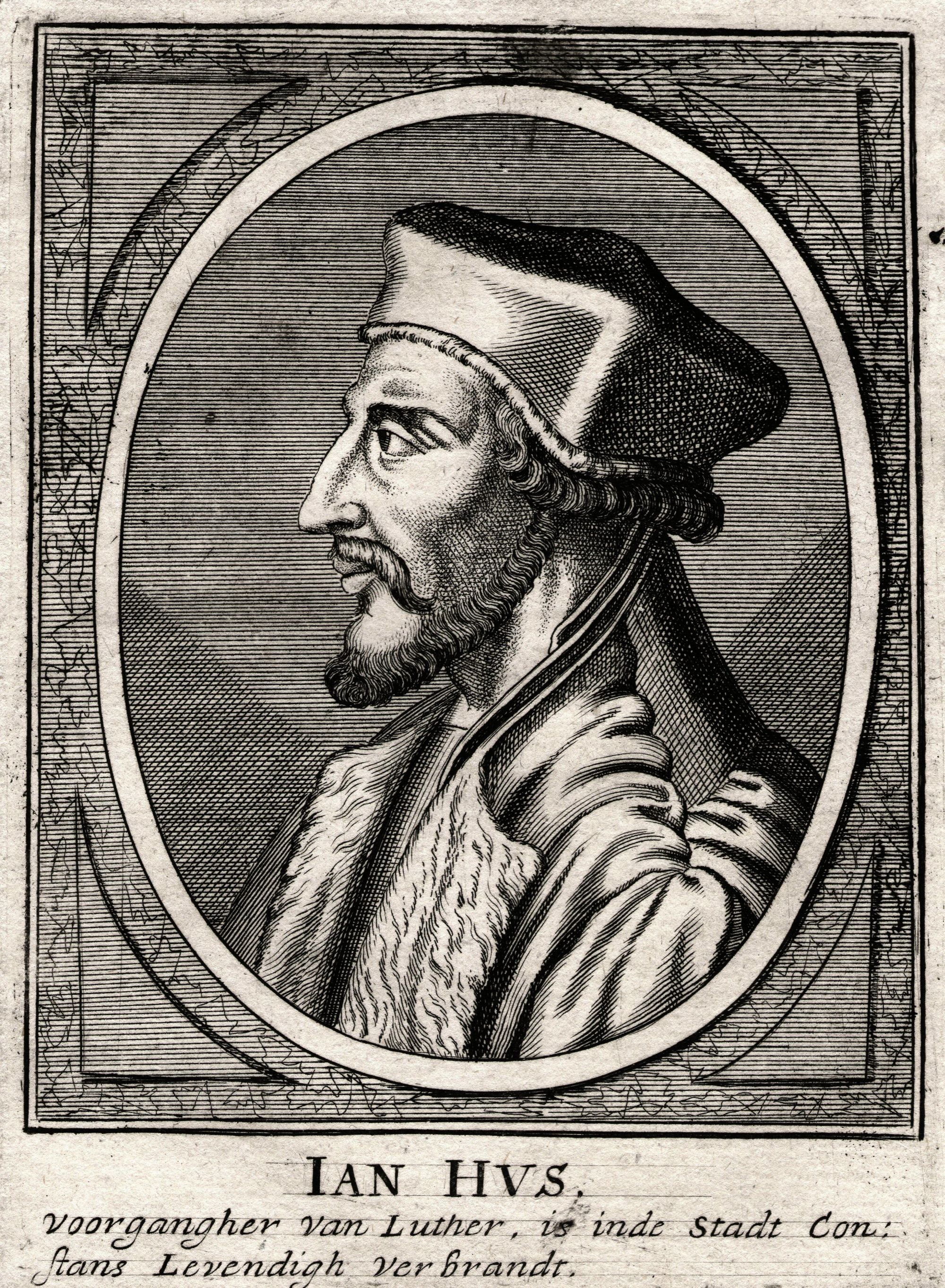 Jan Hus (miedzioryt)